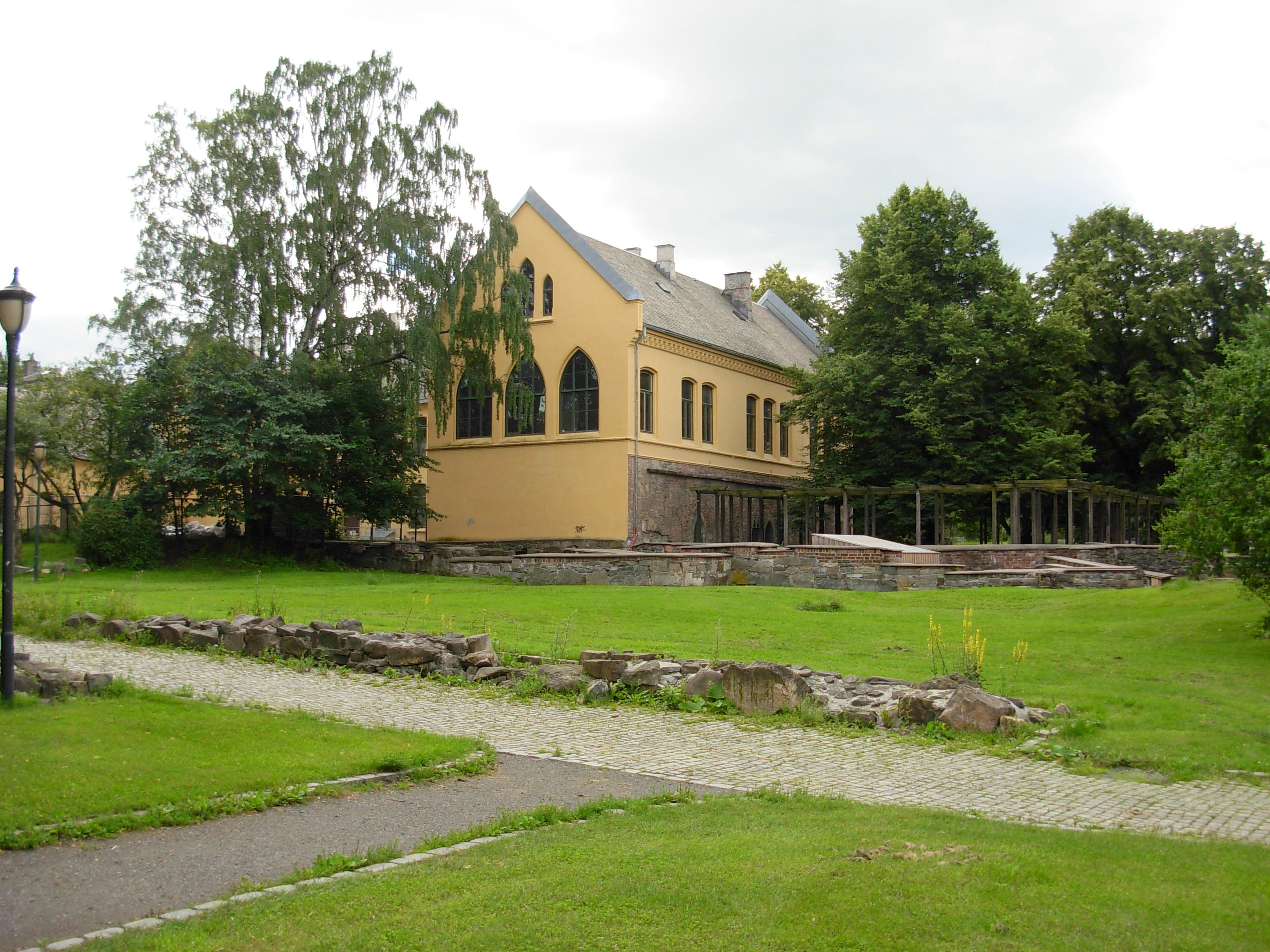 Minneparken, Gamlebyen, Oslo, med Bispegården